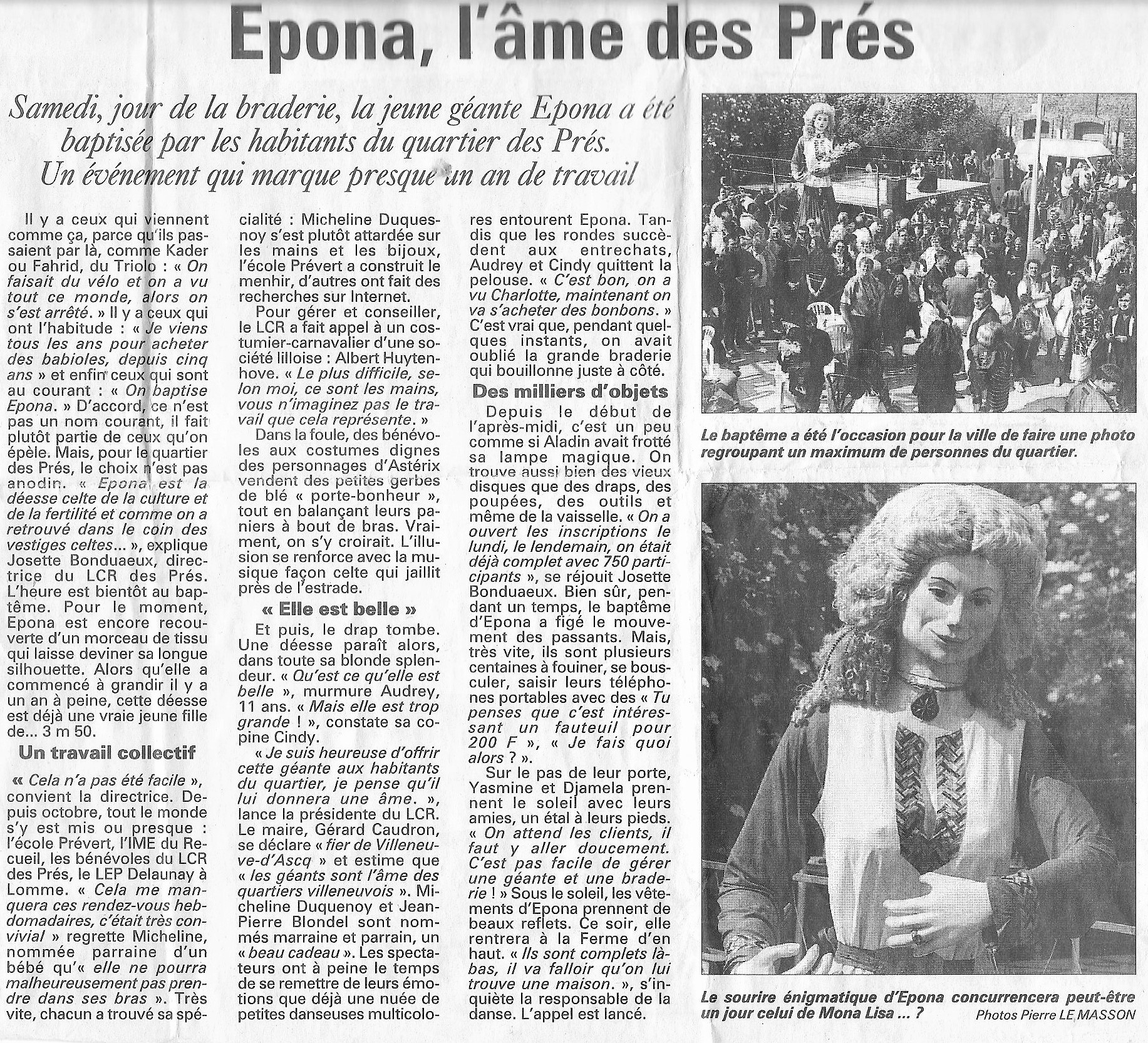 Article "Voix du Nord" du 23 mai 2000 relatif au baptême d'EPONA géant du quartier des Près Villeneuve-d'Ascq, Nord.- France.